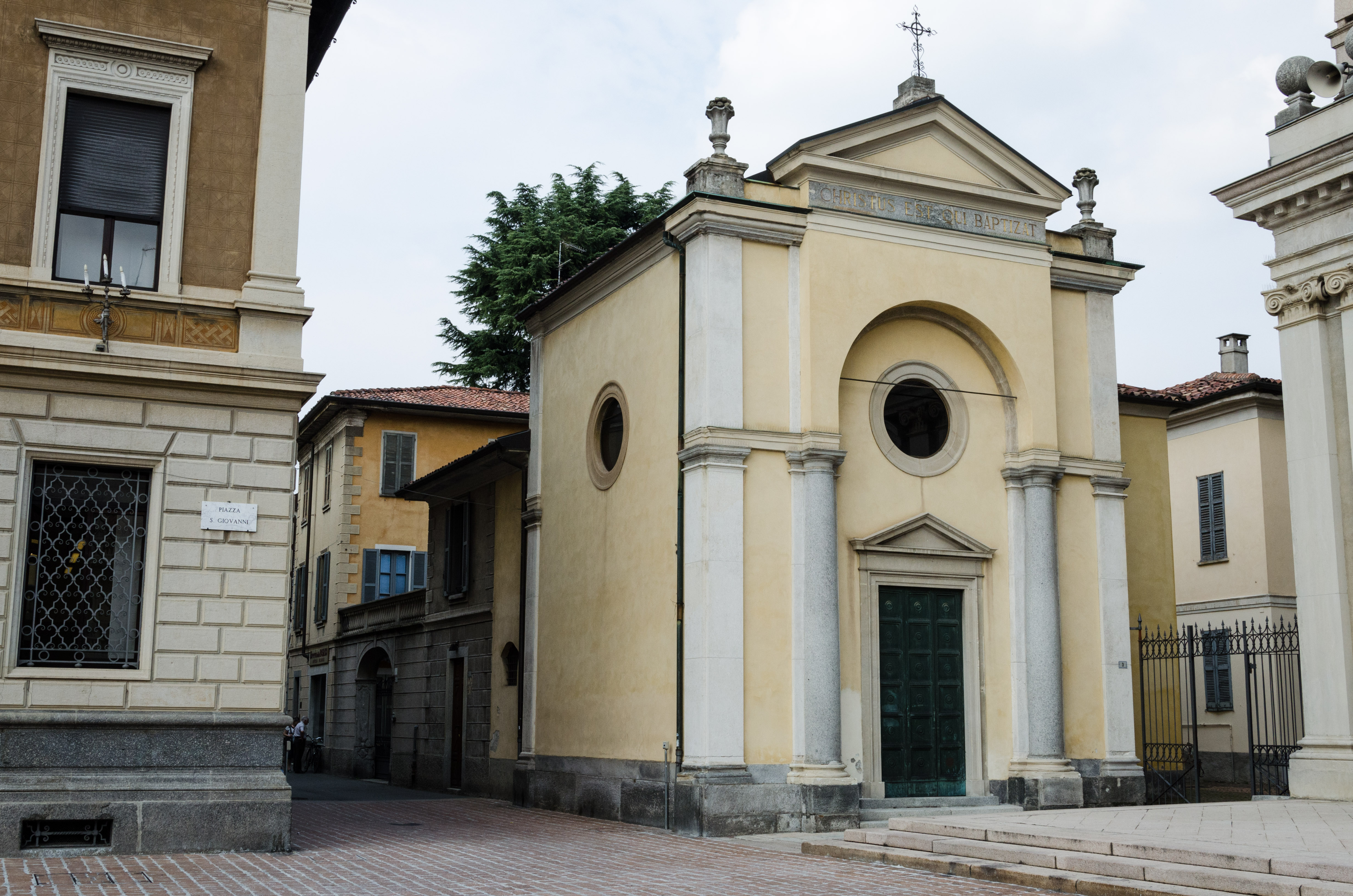 Battistero di San Filippo Neri ID:0120262871 This is a photo of a monument which is part of cultural heritage of Italy.